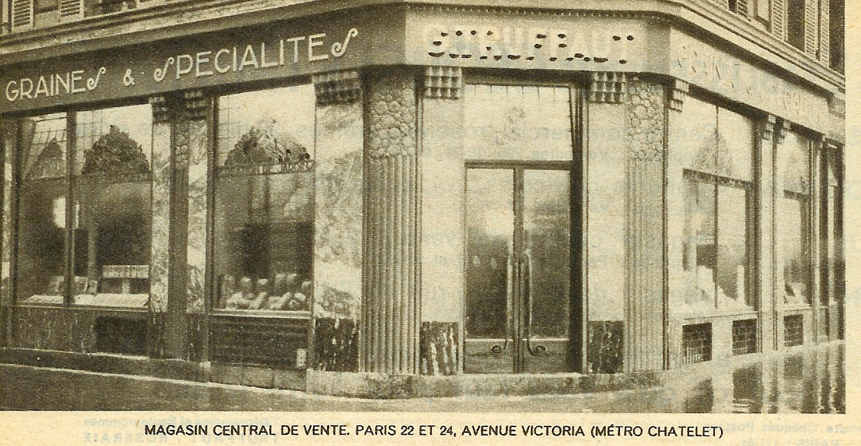 1er magasin au 24 avenue de victoria à Paris